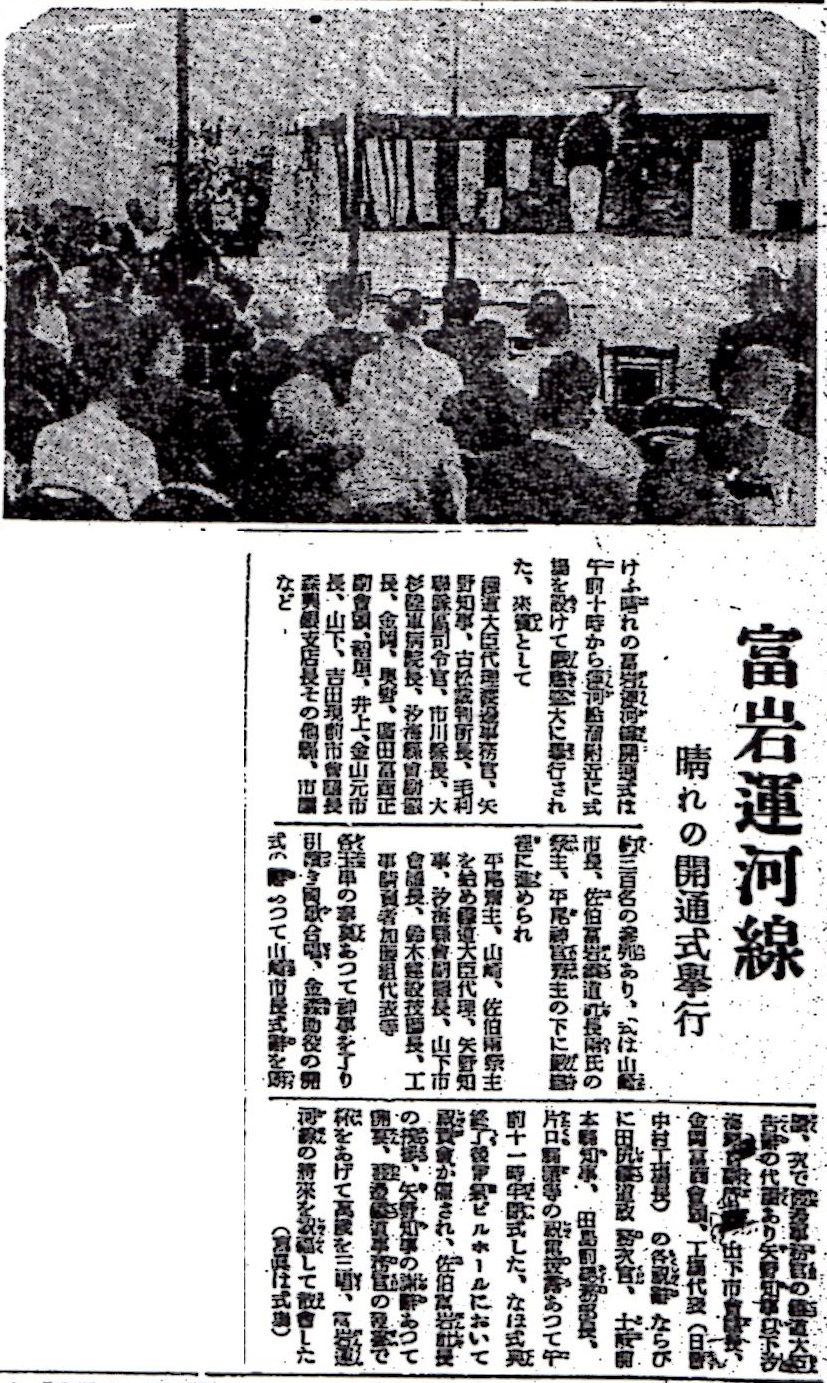 富山市営鉄道運河線開通式